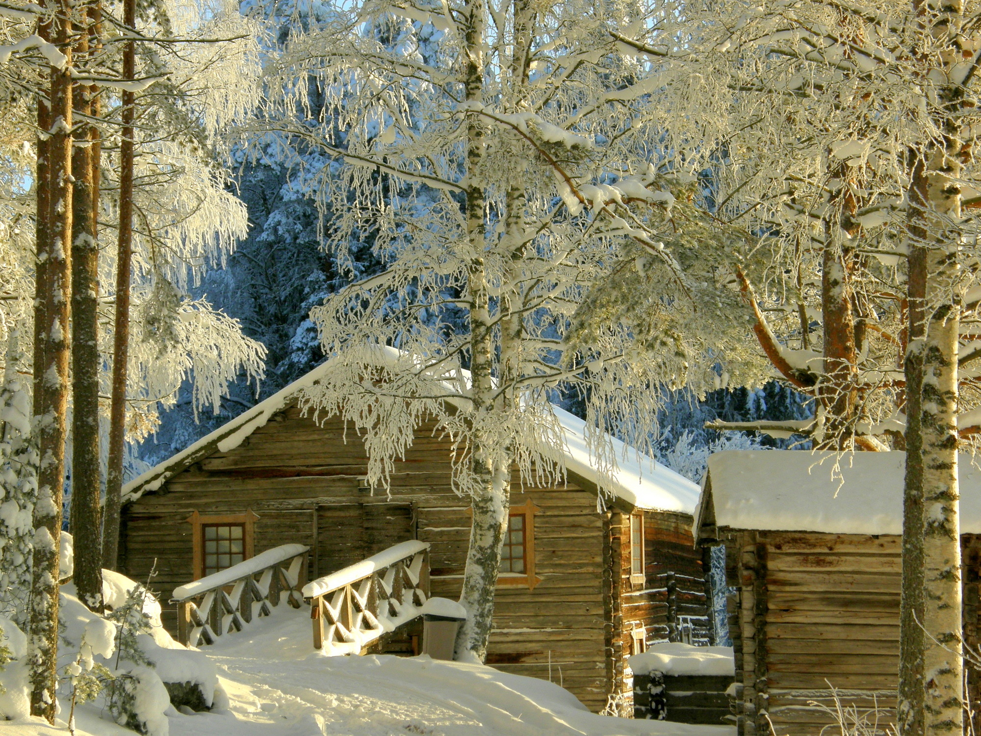 Äänekosken ja Laukaan rajalla sijaitsevan Kapeenkosken rannassa sijaitseva lahkomylly talvisessa asussaan